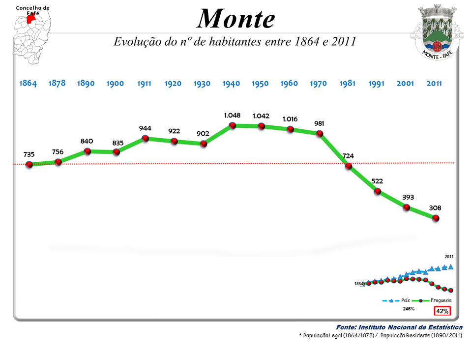 Censos 1864/2011